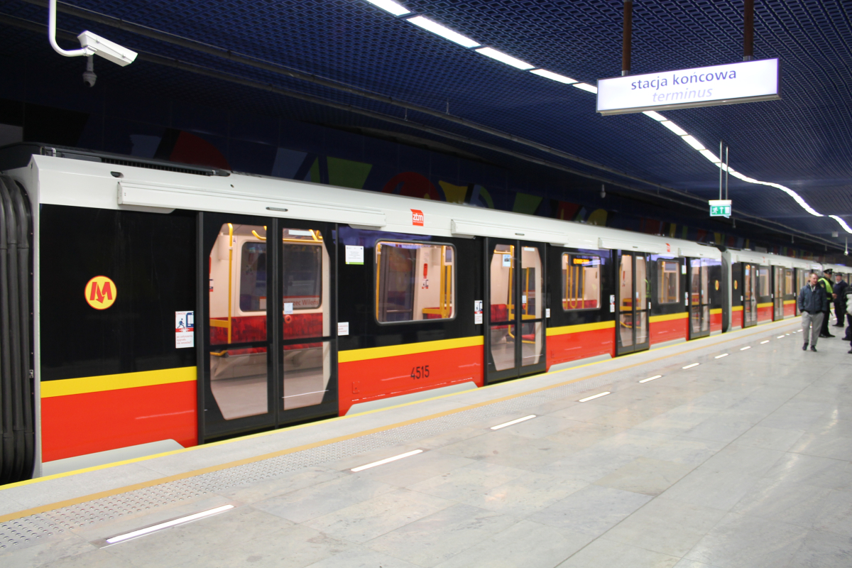 Siemens Inspiro (pociąg nr 55) skończył pierwszy przejazd ze stacji C9 Rondo Daszyńskiego do stacji C15 Dworzec Wileński.